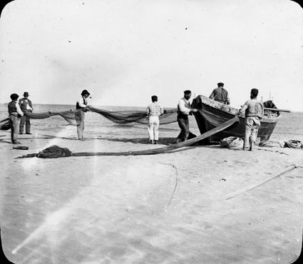 Fonds Trutat - Photographie ancienne Cote : TRU C 592 Localisation : Fonds ancien (S 30) Original non communicable Titre : Pêcheurs à Saint-Jean-de-Luz, Pyrénées-Atlantiques Auteur : Trutat, Eugène Rôle de l’auteur : Photographe Lieu de création : Saint-Jean-de-Luz (Pyrénées-Atlantiques) Date de création : 1859-1910 [entre] Mesures : : 9 x 10 cm Mot(s)-clé(s) : -- Océan -- Bord de mer -- Pêcheur -- Pêche -- Barque -- Filet -- Plage -- Sable -- Homme -- Saint-Jean-de-Luz (Pyrénées-Atlantiques) -- Saint-Jean-de-Luz (Pyrénées-Atlantiques ; canton) -- Aquitaine (France) -- Atlantique (océan) -- Pays Basque (France) -- 19e siècle, 2e moitié -- 20e siècle, 1e quart Médium : Photographies -- Positifs sur plaque de verre -- Noir et blanc -- Paysages Bibliothèque de Toulouse. Domaine public